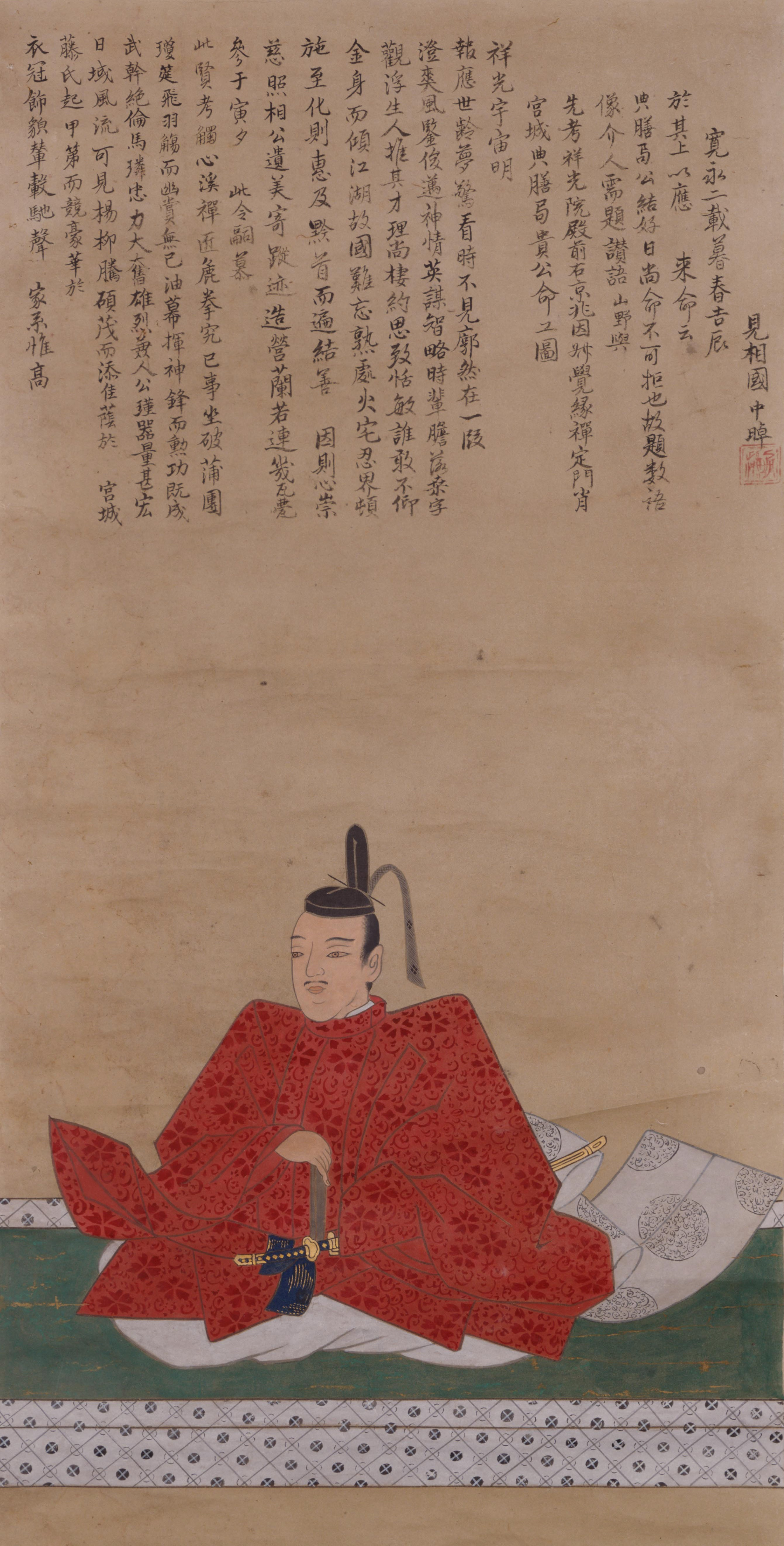 旗本宮城氏初代当主・宮城頼久の肖像画(模本)。